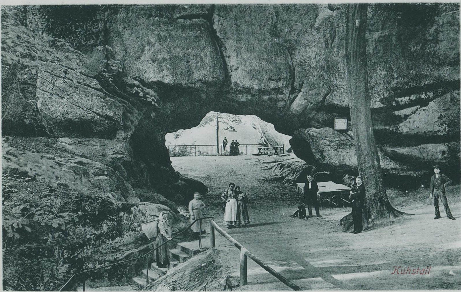 Kuhstall (Sächsische Schweiz)